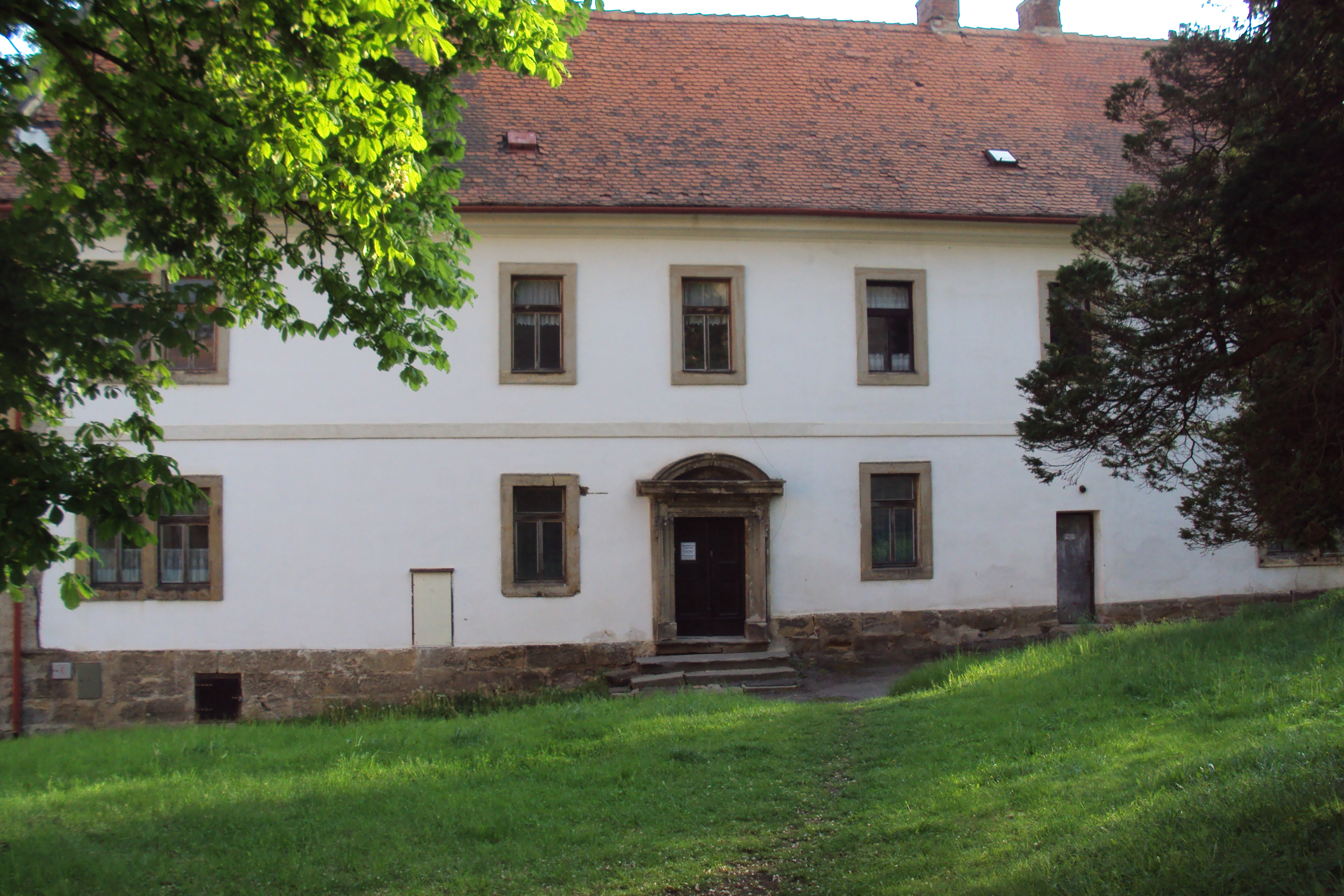 Římsko katolická fara Stráž, U Potoka 144, od kostela.